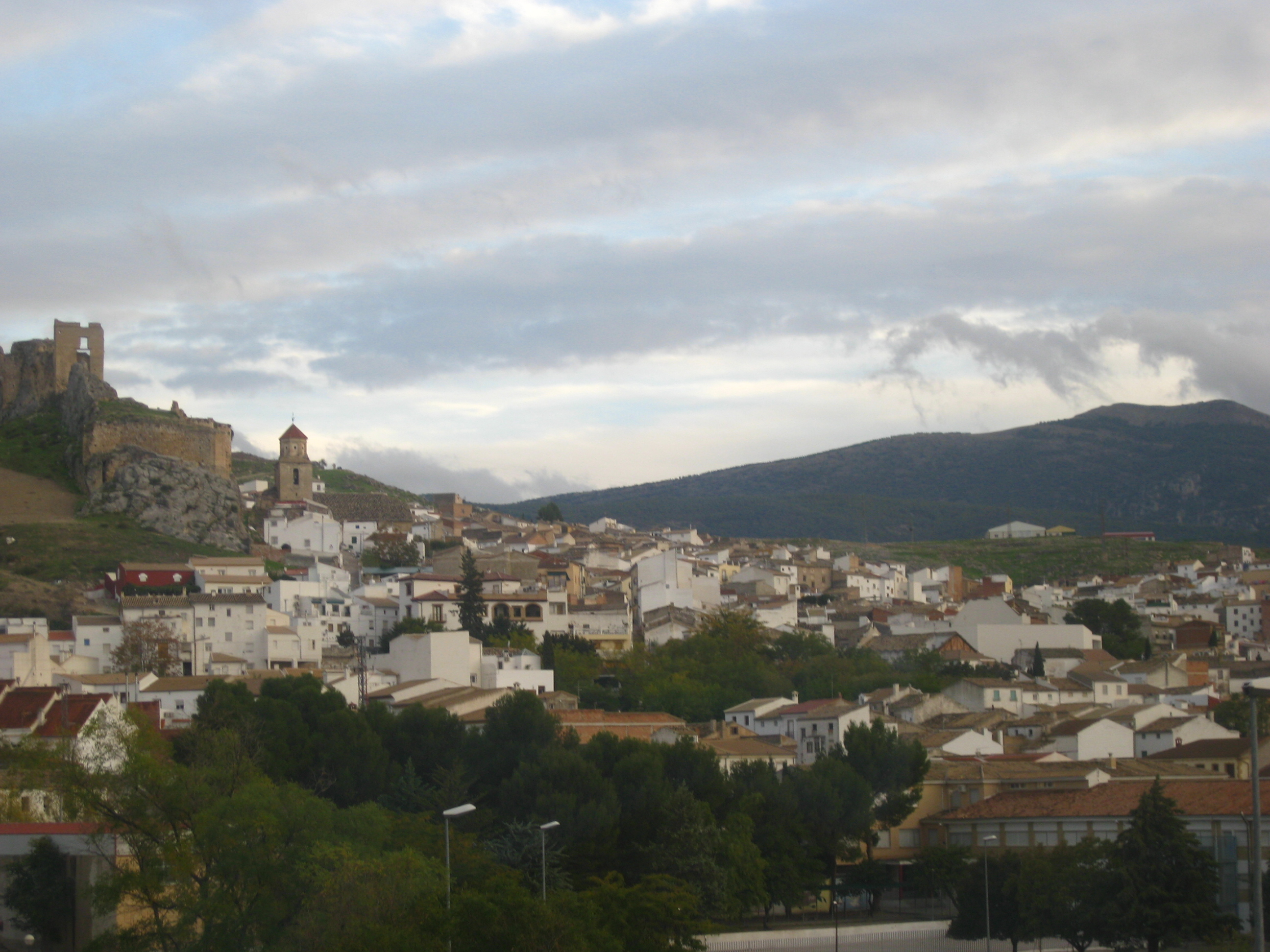 Panorama del pueblo